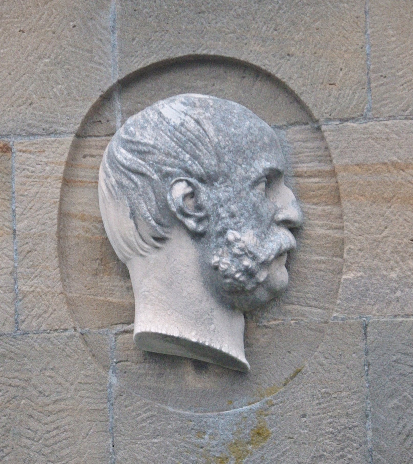 Franz Peter Buhl (1809-1862), bayerischer und badischer Landtagsabgeordneter, Büste vom Grab auf dem Friedhof Deidesheim